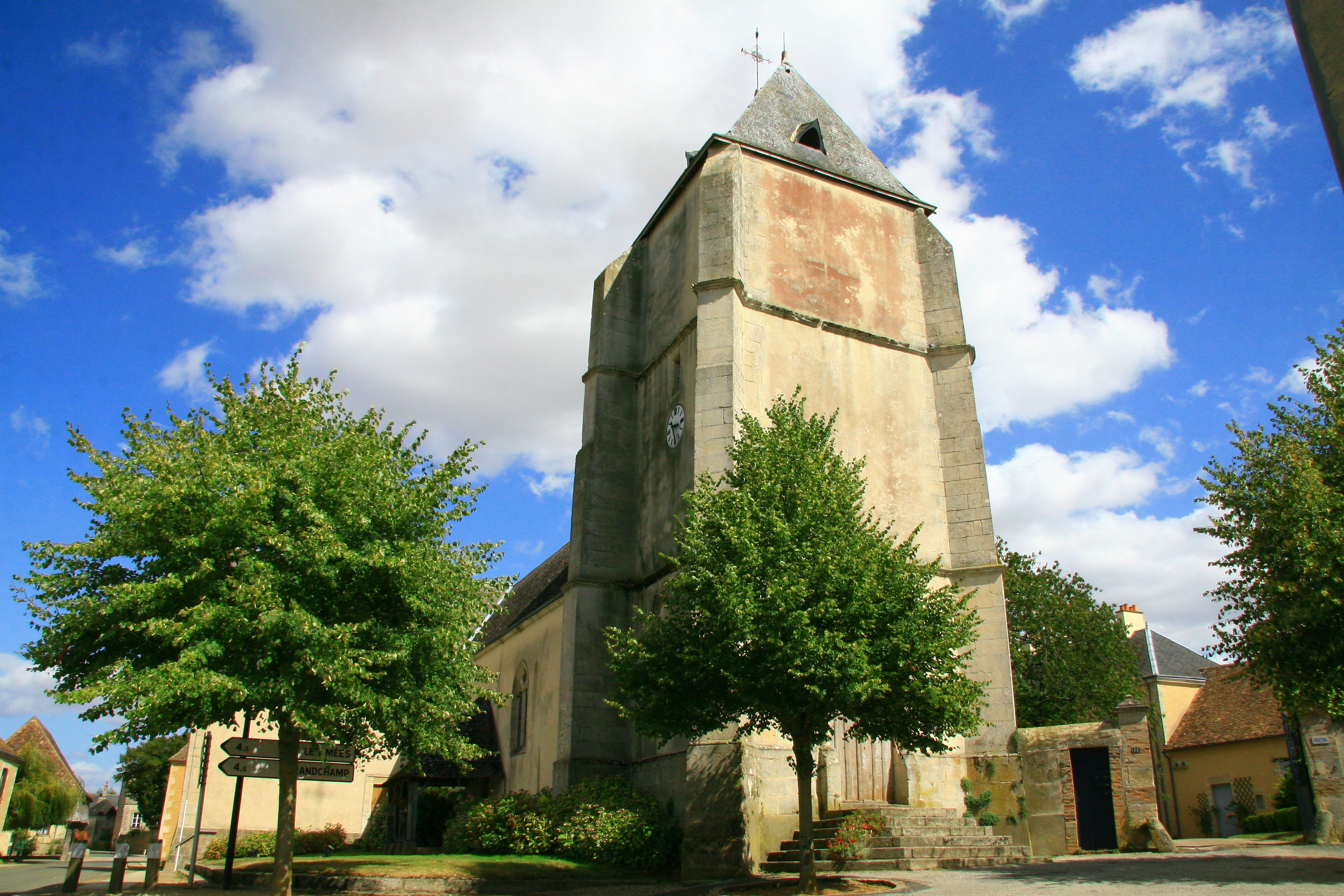 Église Saint-Pierre de René, Sarthe, Pays de la Loire, France